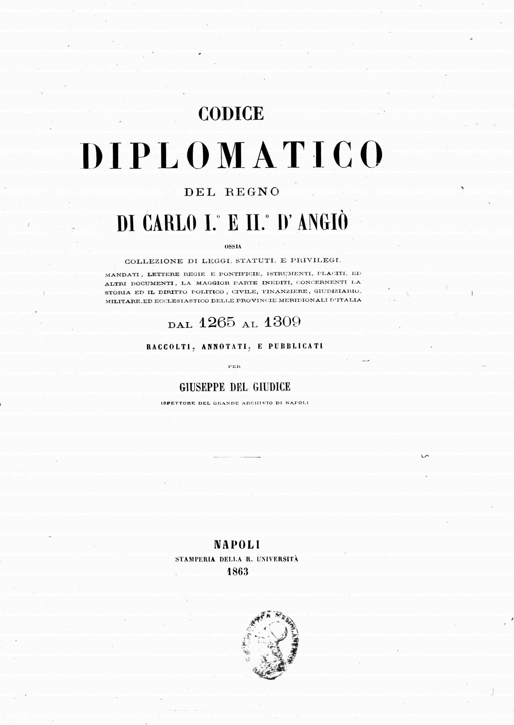 Frontespizio